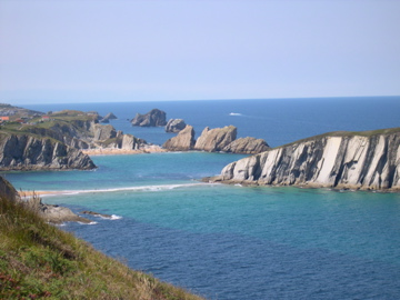 Playa de Covachos (Cantabria, España)